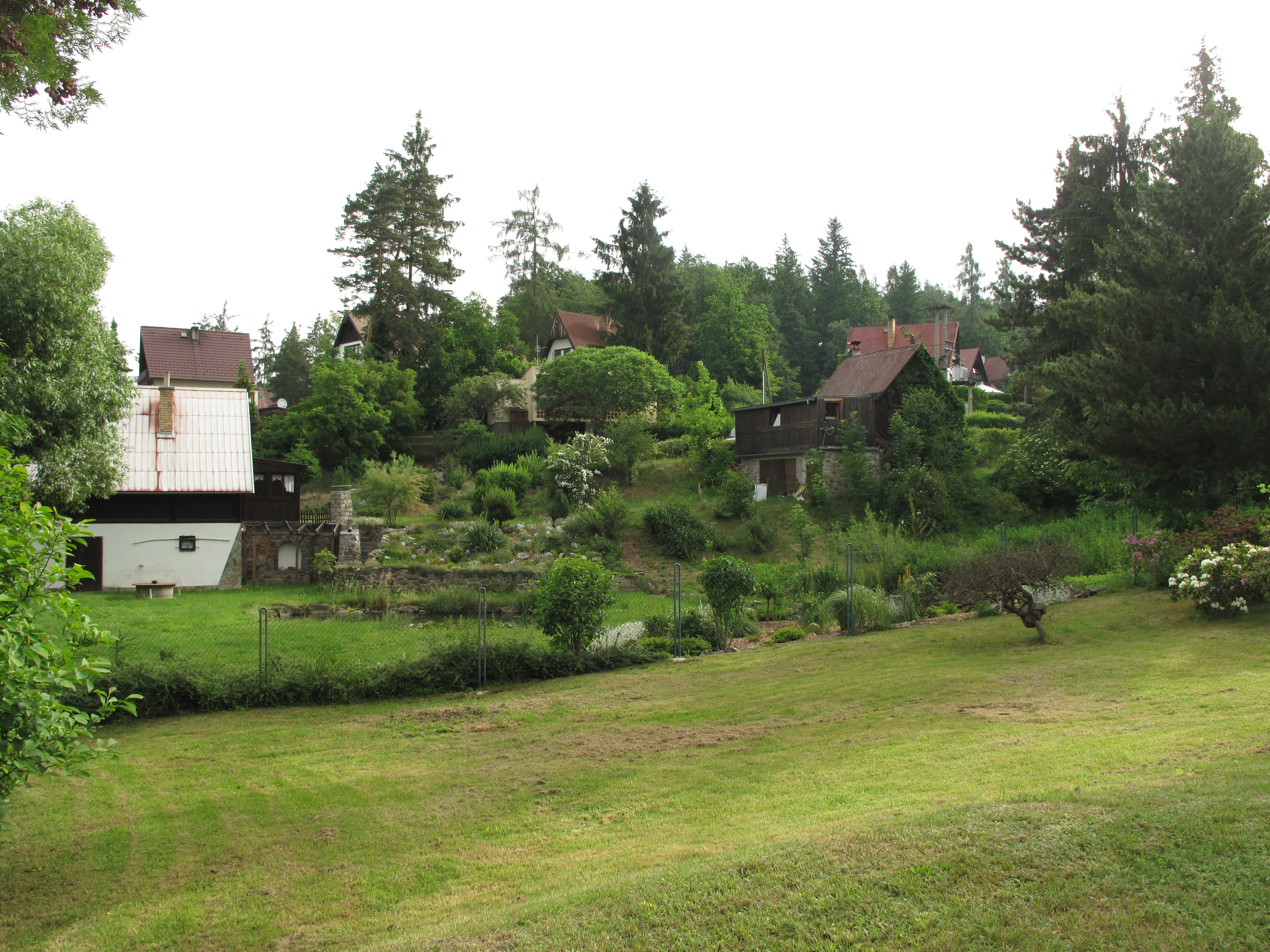 Podolsko, Česká republika.